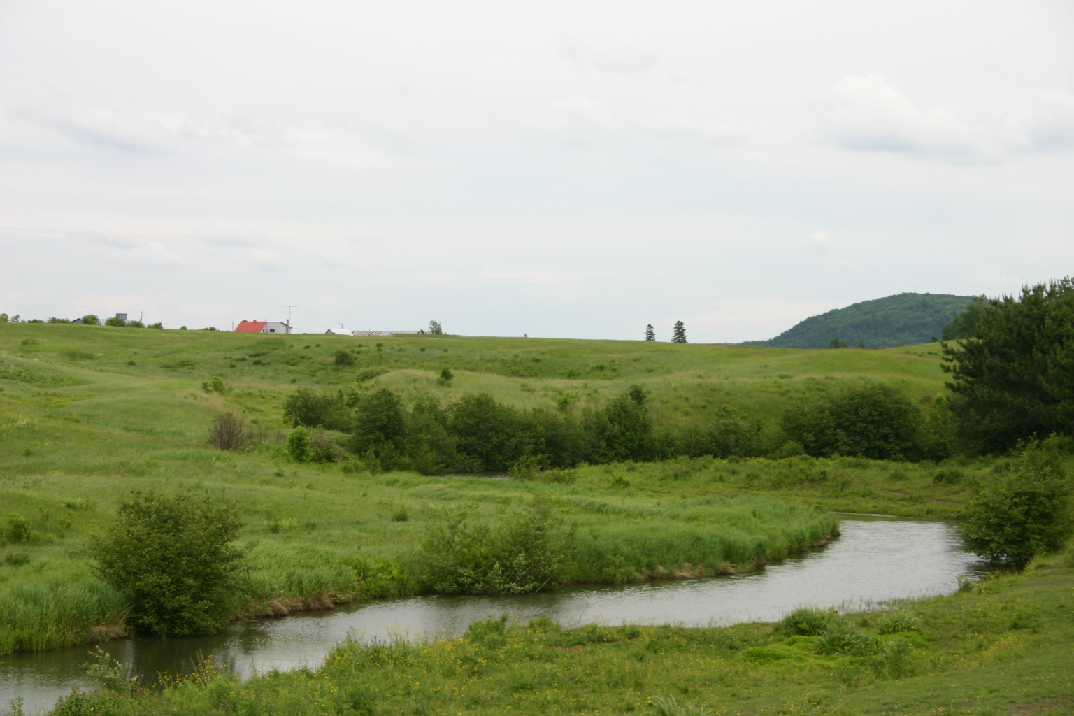 La petite rivière Mandeville photographiée depuis le pont du Chemin de la Rivière.